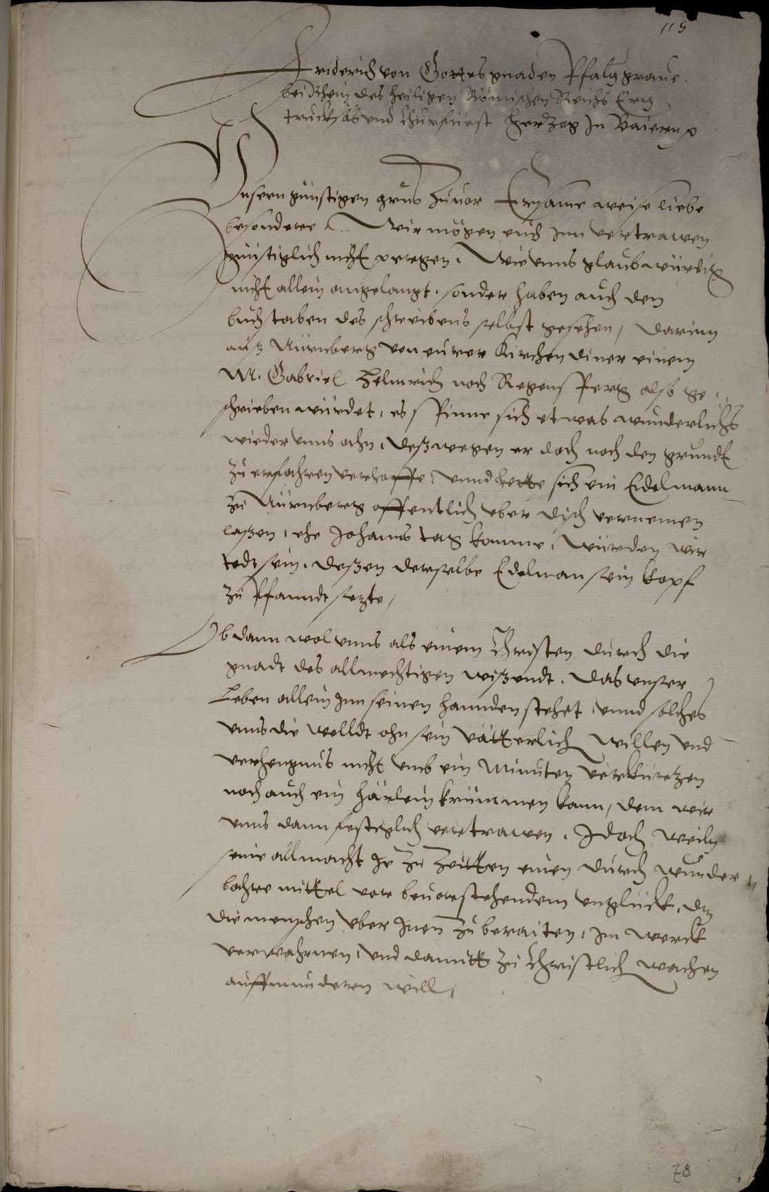 Codex Palatinus germanicus 8, Blatt 78r der Handschrift (Seite 1 v. 2) : Brief Kurfürst Friedrichs IV. von der Pfalz an den Bürgermeister und den Rat der Stadt Nürnberg; Amberg, 1. Mai 1597 (Original, eigenhändige Unterschrift Friedrichs (Folgeblatt), Siegel erhalten)